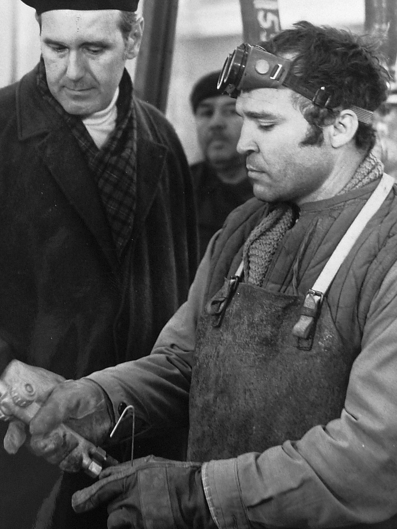 Madaras József színművész (jobbra)